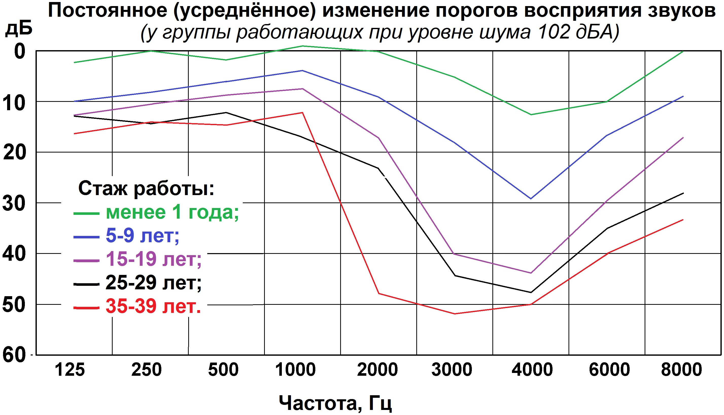 На диаграмме показаны усреднённые значения постоянного ухудшения слуха у группы работниц ткацкого предприятия, при разном трудовом стаже работы в условиях шума 102 дБА. Источник Измеров Н.Ф., Суворов Г.А., Прокопенко Л.В. Человек и шум. — Москва: ГЭОТАР-МЕД, 2001. — 384 с. — 1000 экз. — ISBN 5-9231--0057-6.